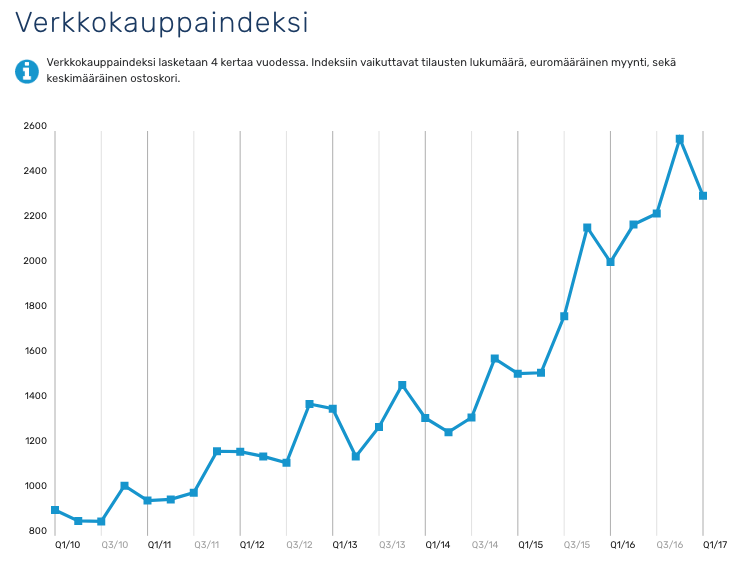 Vilkas Group julkaisee neljästi vuodessa verkkokauppaindeksin, joka kuvaa verkkokaupankäynnin kehitystä Suomessa. Verkkokauppaindeksin tausta-aineisto kerätään Vilkas Groupin asiakkaiden verkkokaupoista vuoden 2006 alusta alkaen.